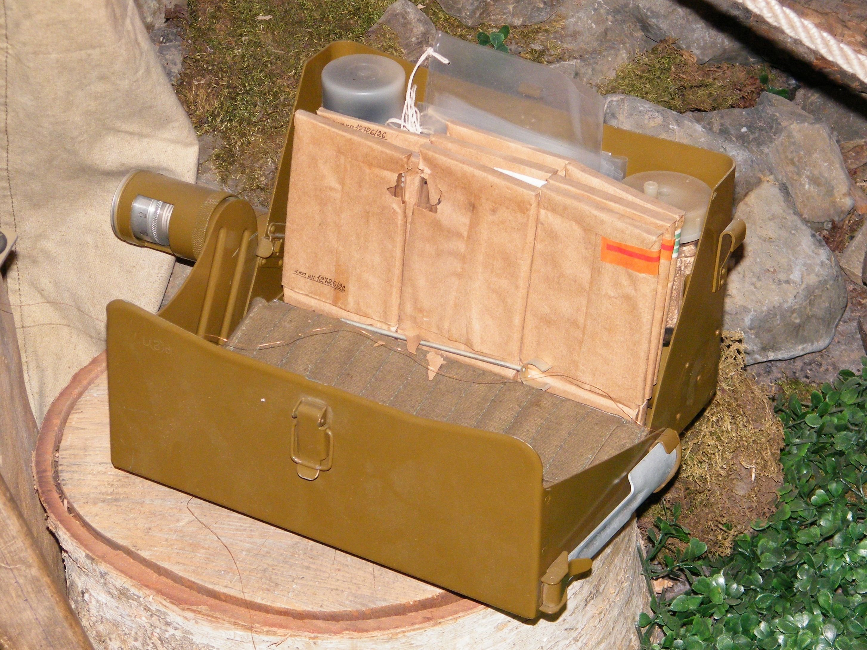 Войсковой прибор химической разведки